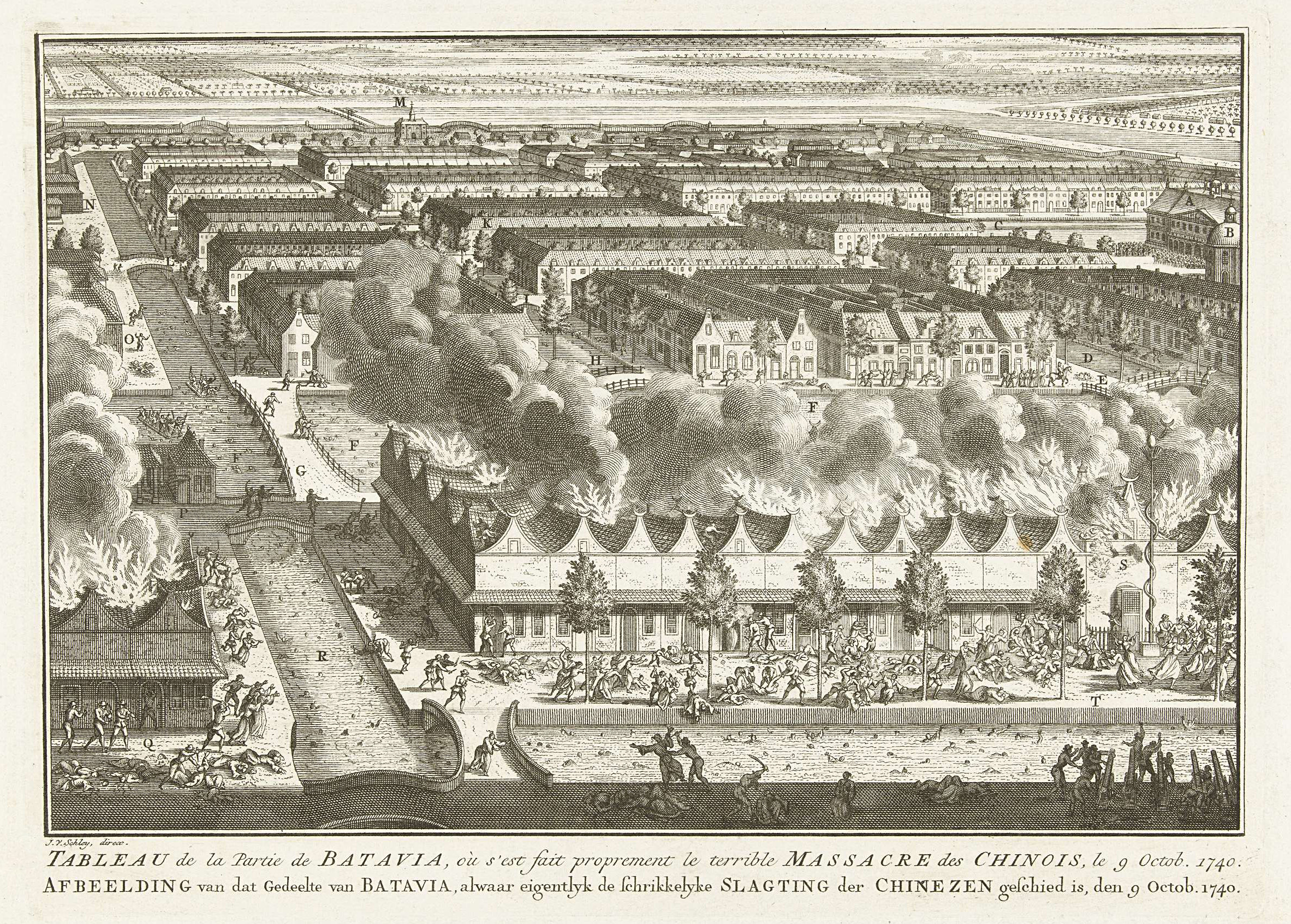 1740 Batavia massacre